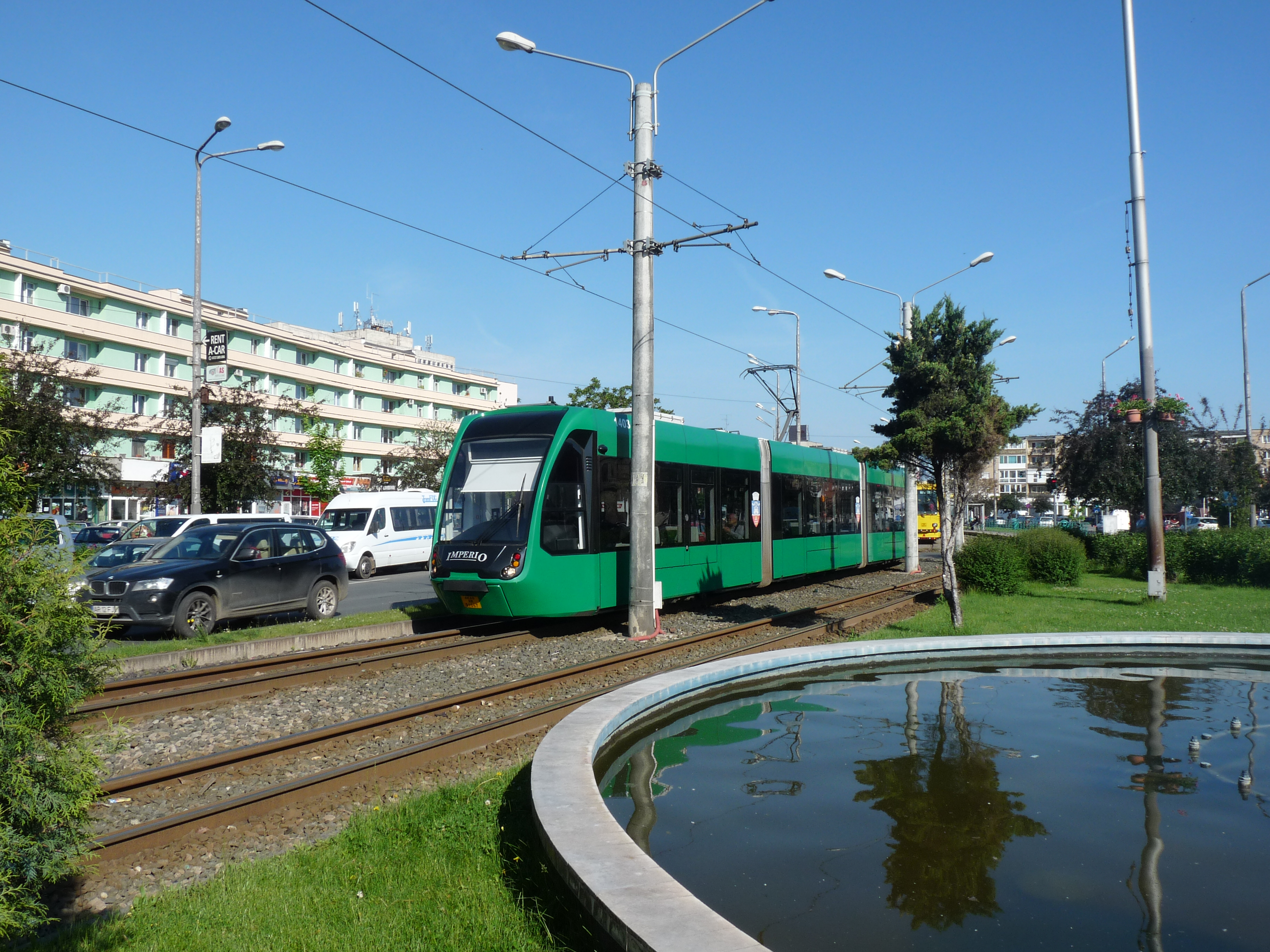 Trams in Arad